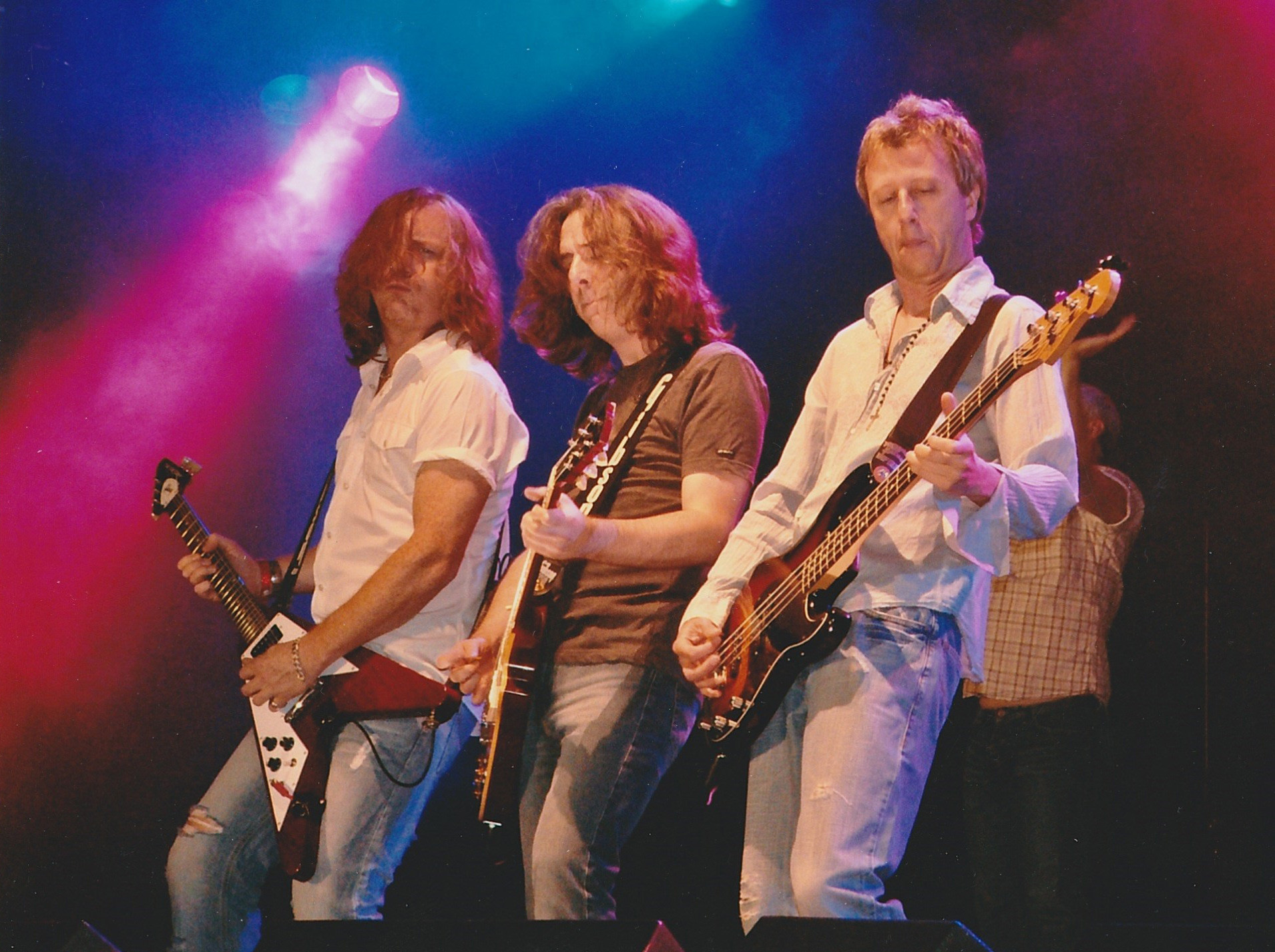 Thunder, Guilfest 2005